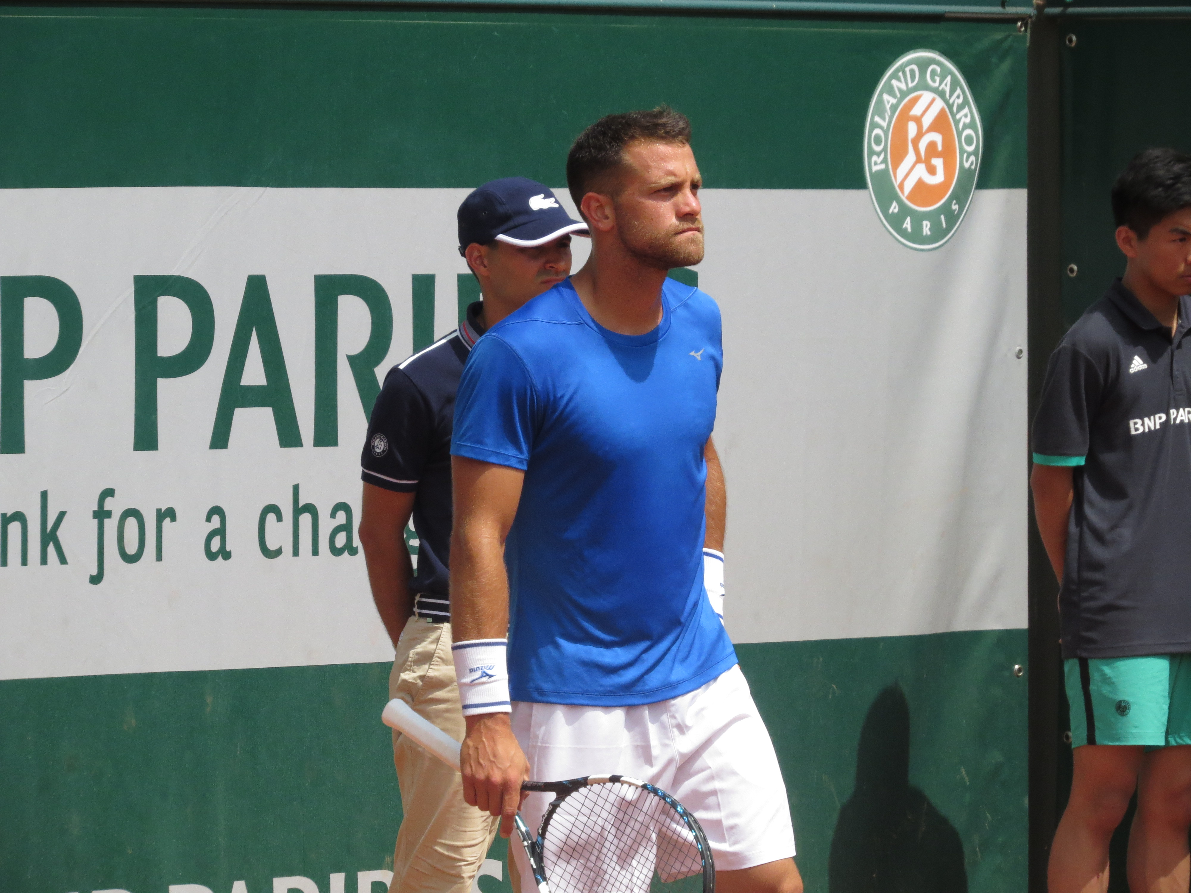 Ricardo Ojeda Lara lors de son deuxième tour des qualifications face à Denis Kudla (court n°13)